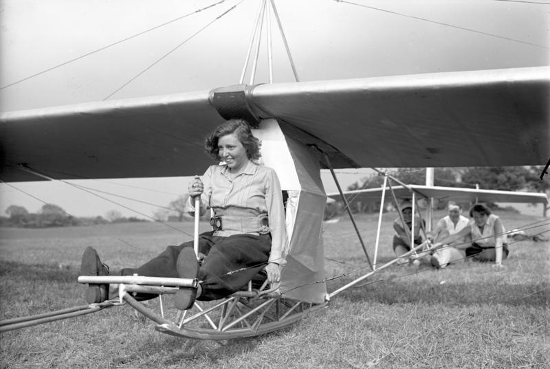 Die Flug-Studentin! In den Gatower Bergen bei Berlin hat die Deutsche Hochschule für Leibesübungen einen Segelflugkursus für Flugstudentinnen eingerichtet. Unter Leitung eines erfahrenen Fluglehrers werden die Studentinnen im Segelflug ausgebildet. Der Kursus umfasst ein Flug-Semester. Am Schluss des Semesters findet die Hauptprüfung statt. Nach erfolgreichem Bestehen wird die Flug-Studentin mit dem Prädikat "A-Pilotin" ausgezeichnet. Der erste Flug. Die Flug-Studentin am Steuer des Segelflugzeuges erwartet das Startzeichen des Fluglehrers.